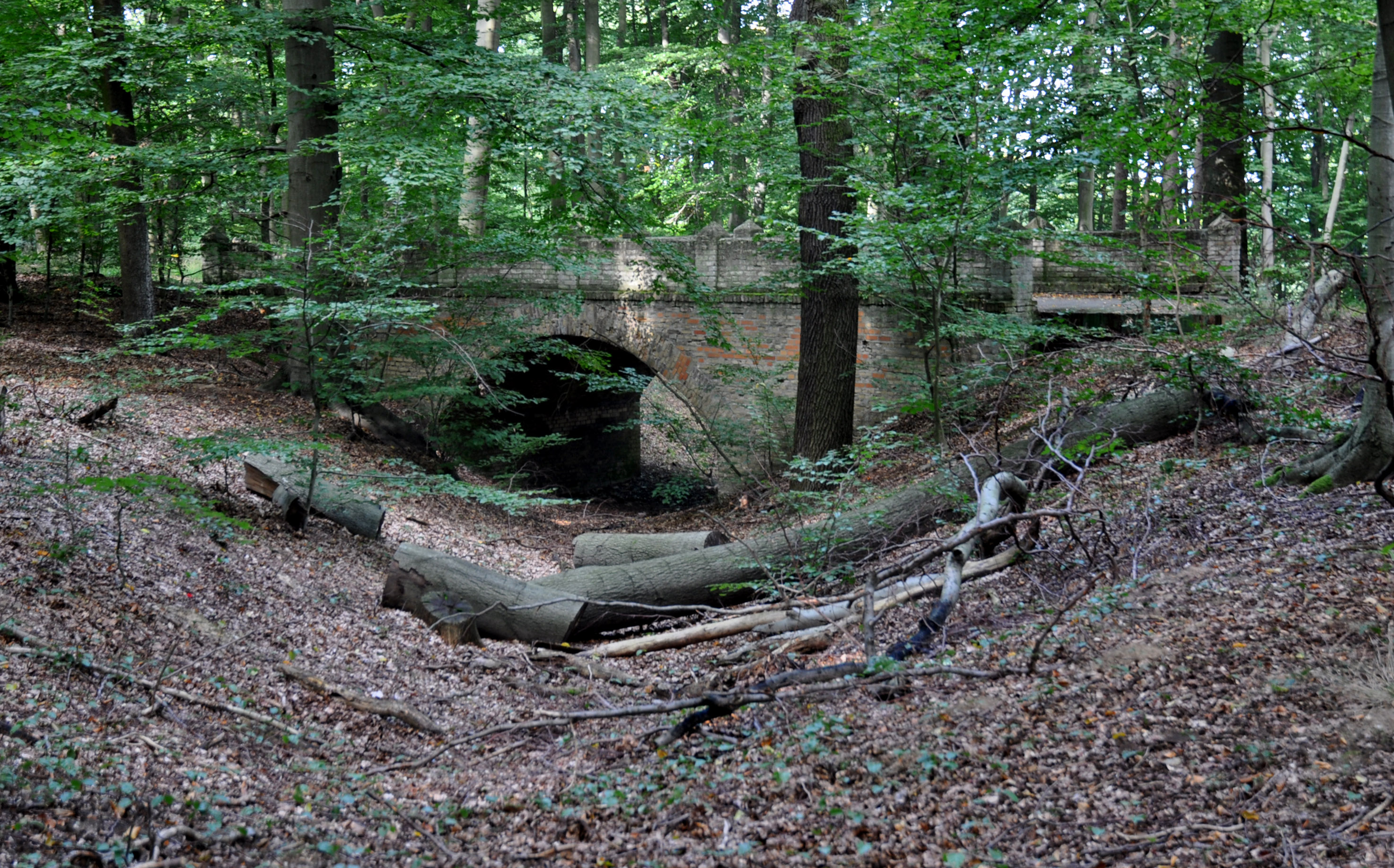 Die Karpatenbrücke im Park von Klein-Glienicke